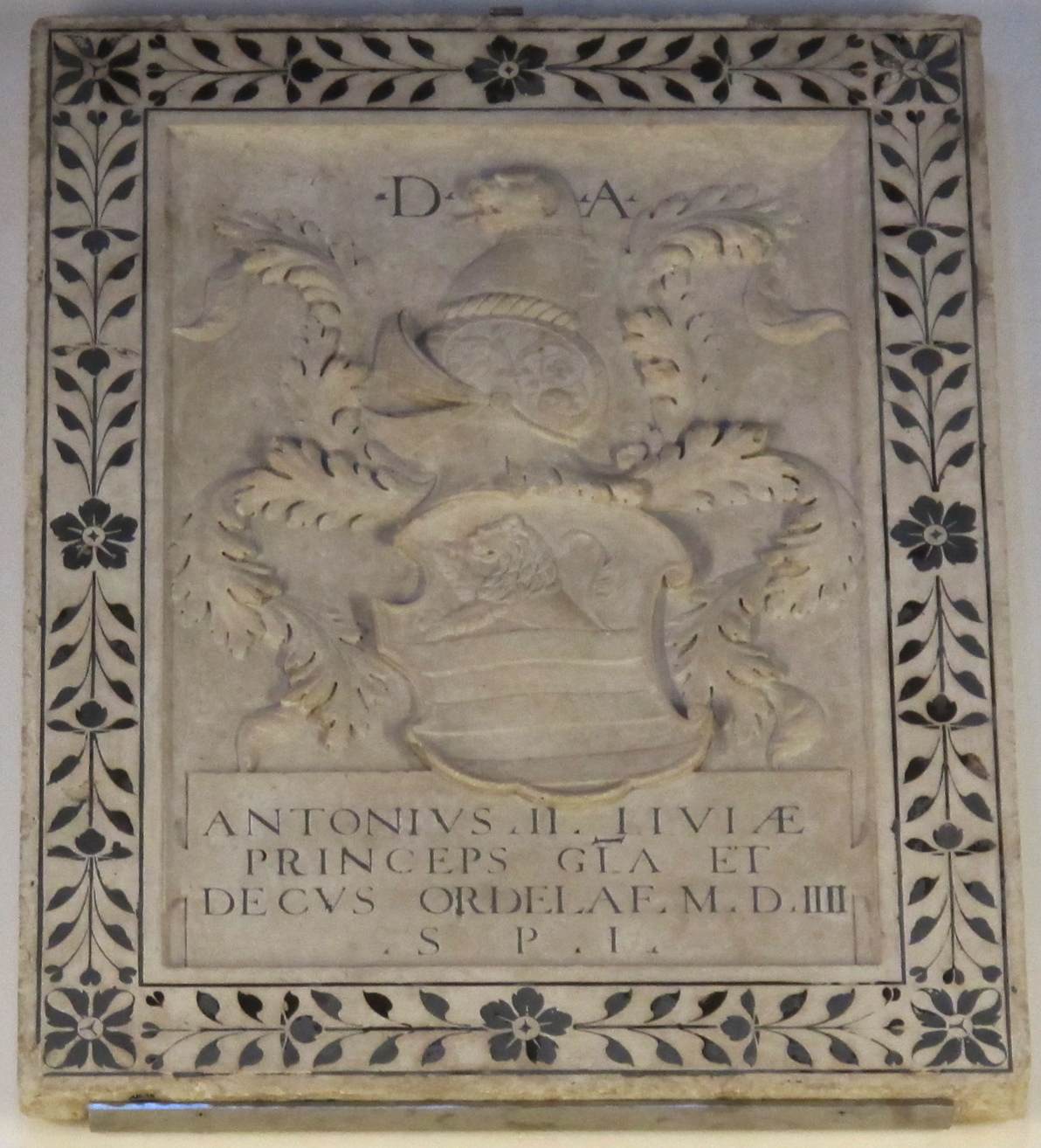 Pietra tombale di antonio ii ordelaffi, dal duomo di forlì